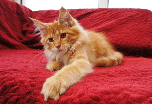 Котёнок мейн кун красного мраморного окраса